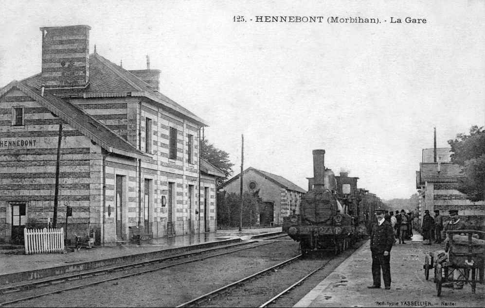 Intérieur de la gare avec le bâtiment voyageurs type PO de l'architecte de la compagnie Phidias Vestier.